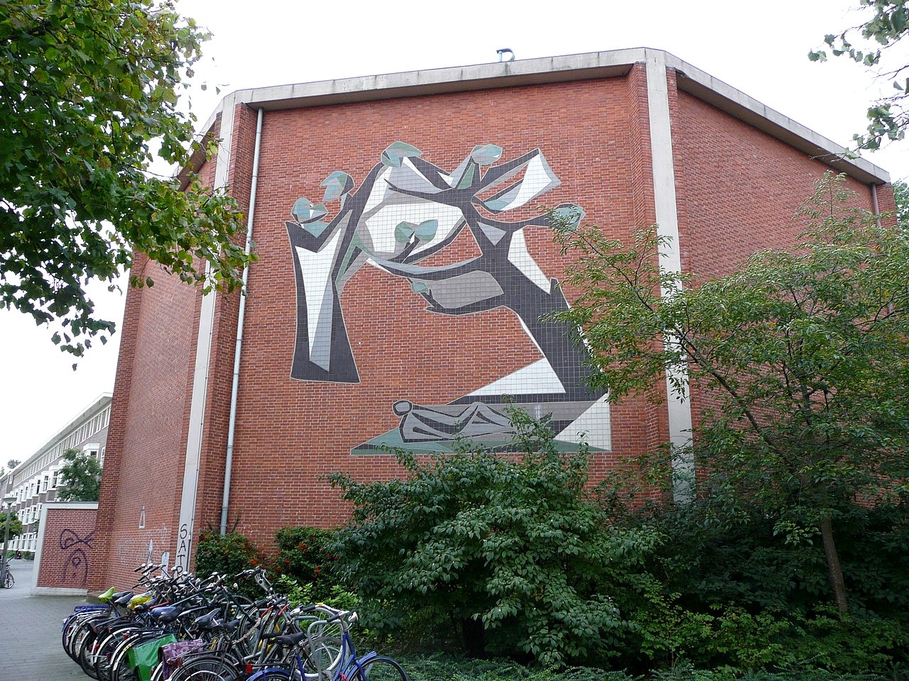 Relief in Amsterdam/The Netherlands